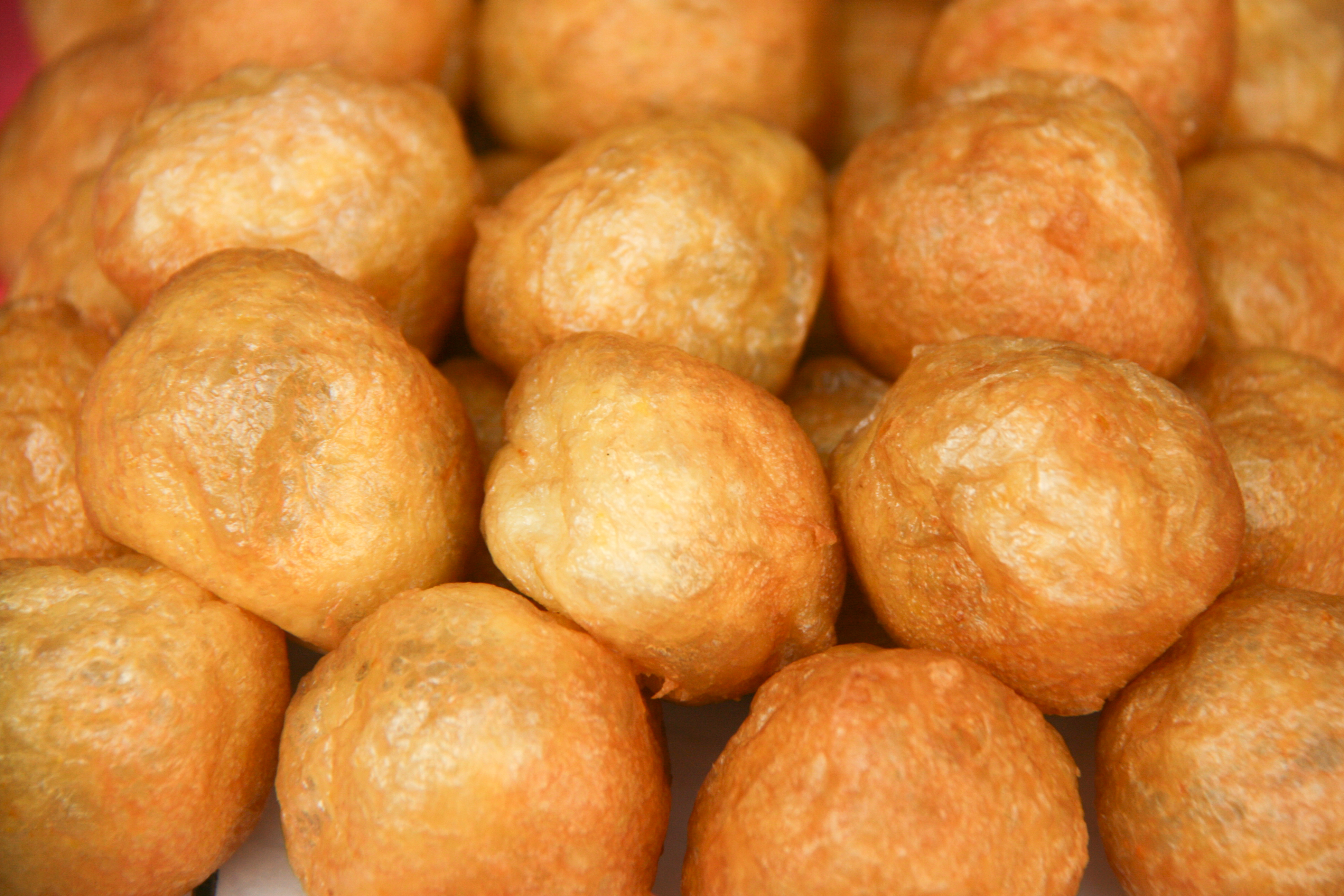 Buñurlos . Día de todos los santos